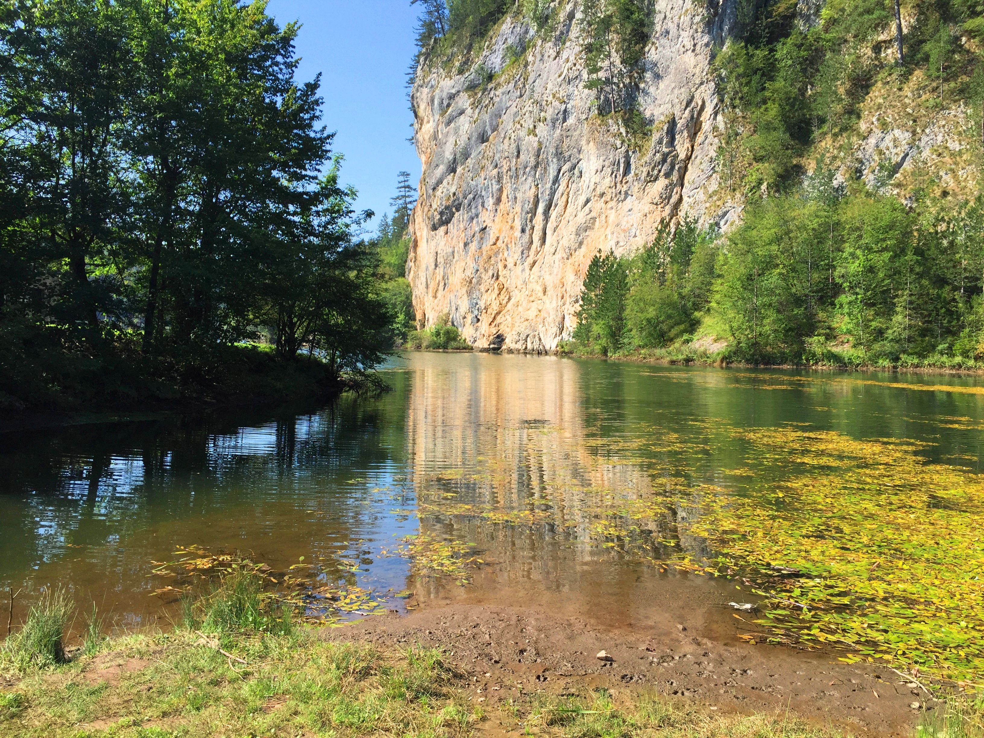 Srpski (latinica): Zaovine se nalaze u Zapadnoj Srbiji, i administrativno pripada teritoriji opštine Bajina Bašta. Predstavlja šumovito područje brdsko-planinskog karaktera koje obuhvata naselje Zaovine sa 28 zaseoka, jezero Zaovine i kanjon Belog Rzava „Sklopovi“. Ово је фотографија заштићеног природног добра у Србији под шифром: НП03This is a a photo of a natural area in Serbia with ID: НП03